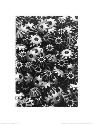 Abbildung stellvertretend Räder schwarz und weiß. Durch Erbschaft erhalten. 1950er Jahre. Auf Arvid Gutschow. Mein Großvater zurück.